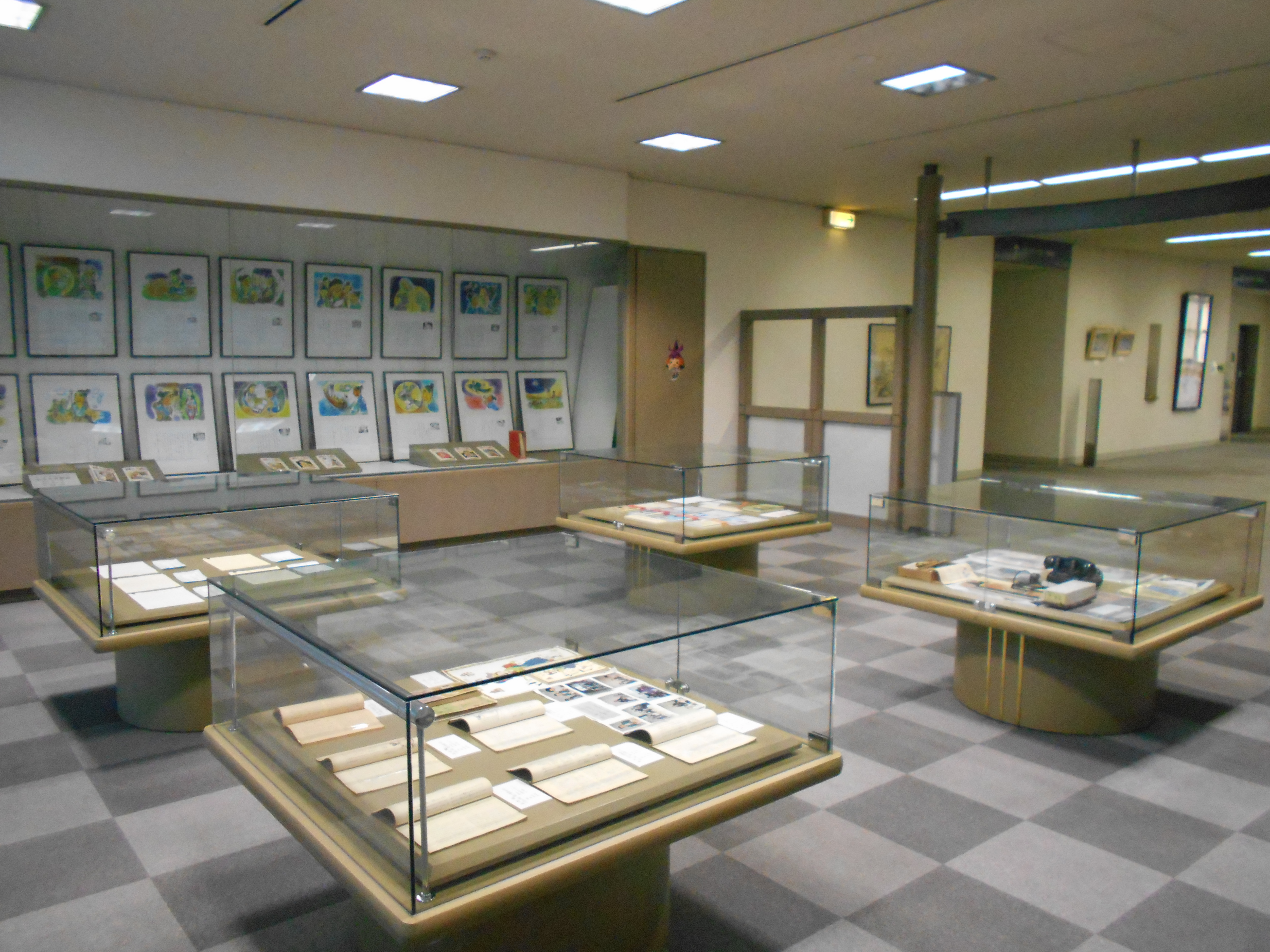 刈谷市中央図書館。2階の展示ホール。